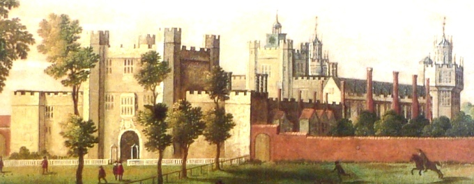 detail: Nonsuch Palace